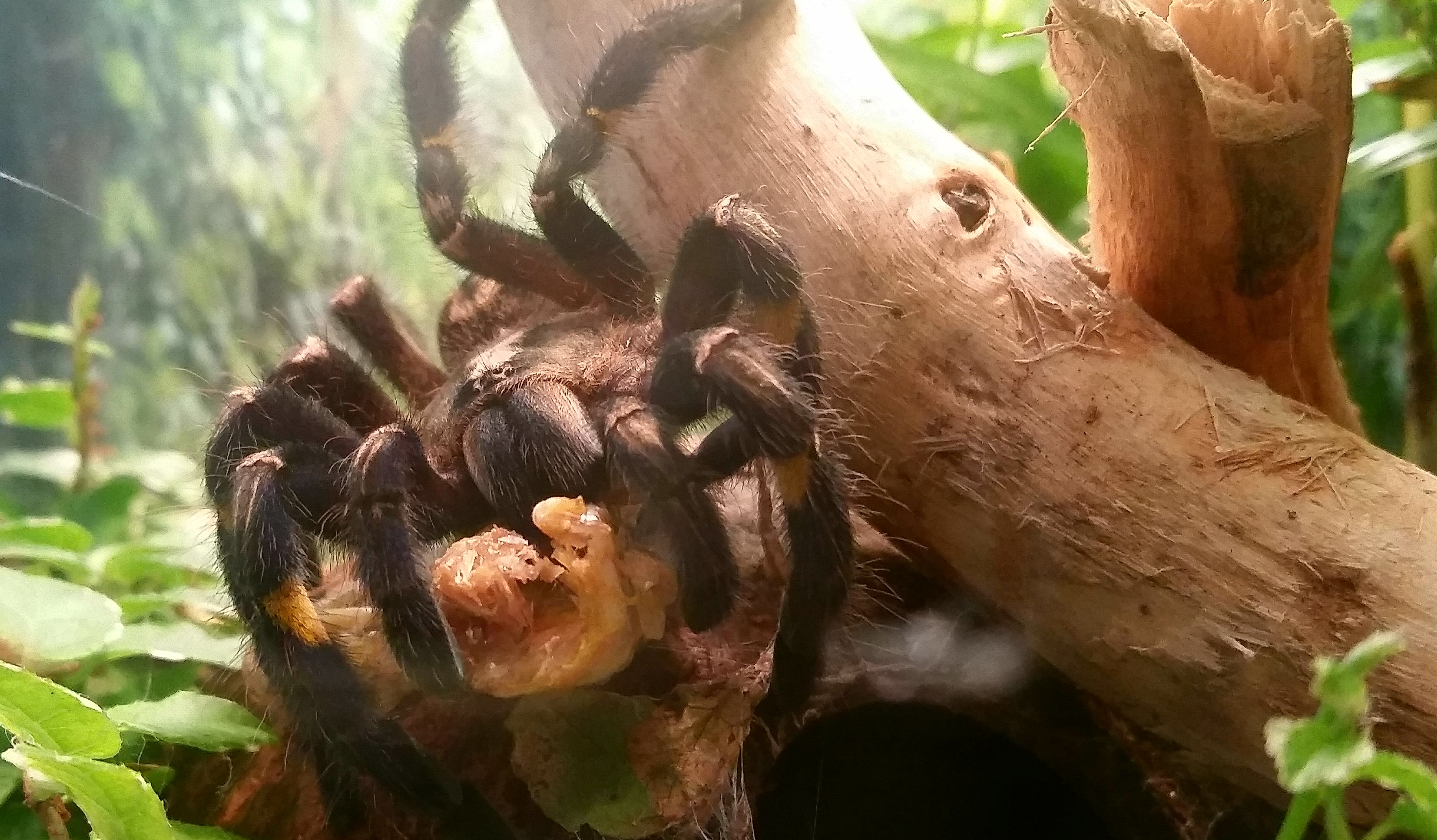 Poecilotheria metallica frisst